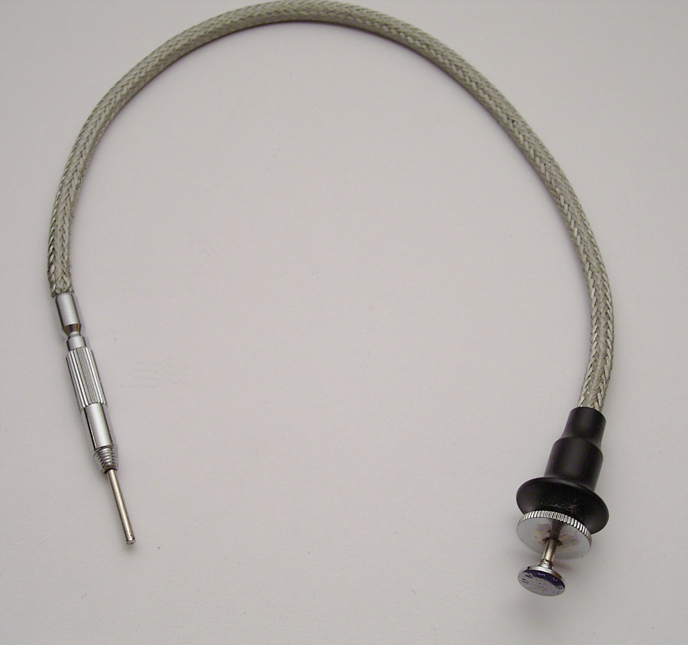 Einfacher mechanischer Drahtauslöser mit Feststellmöglichkeit